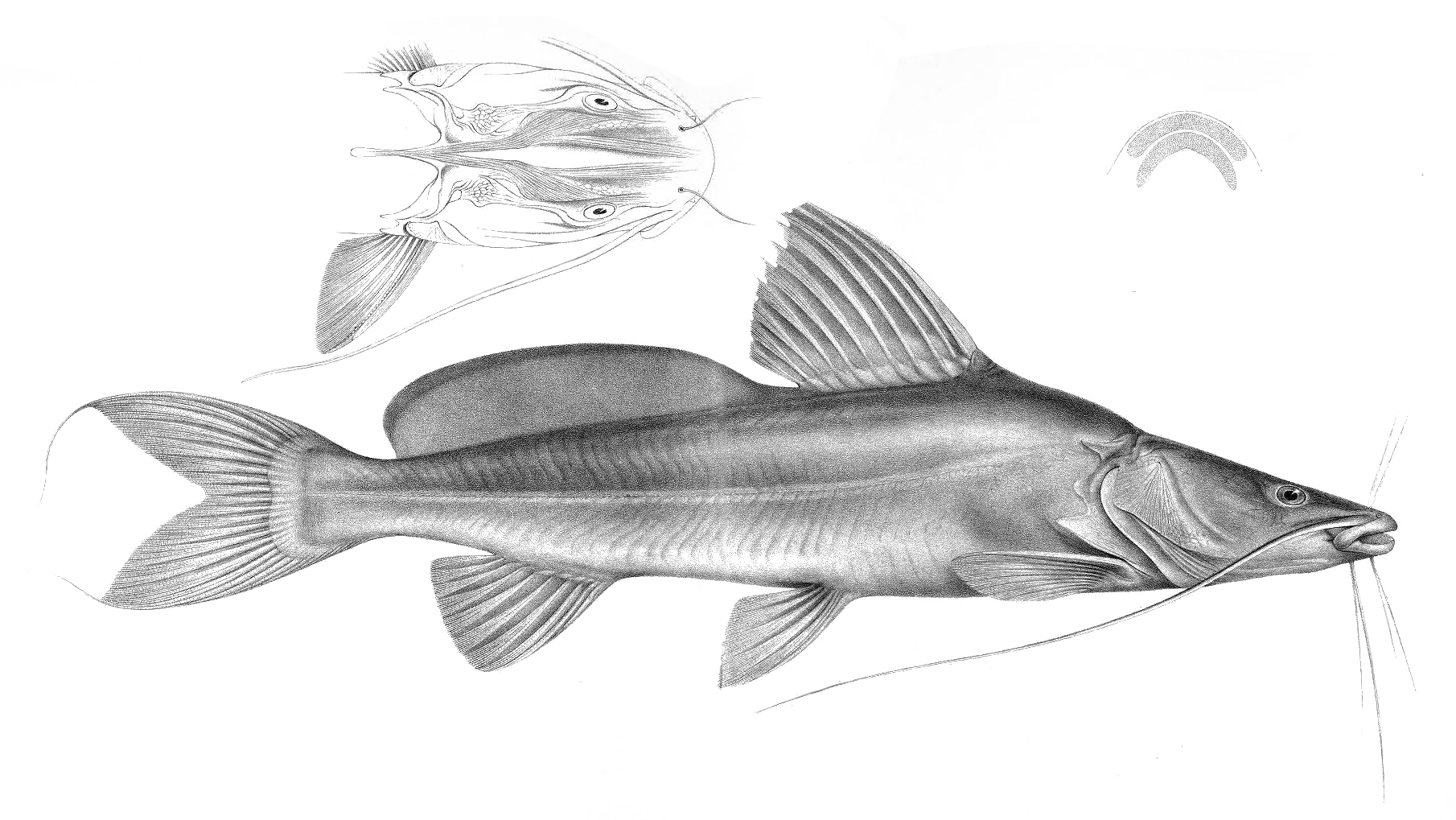 Bagrus bajad